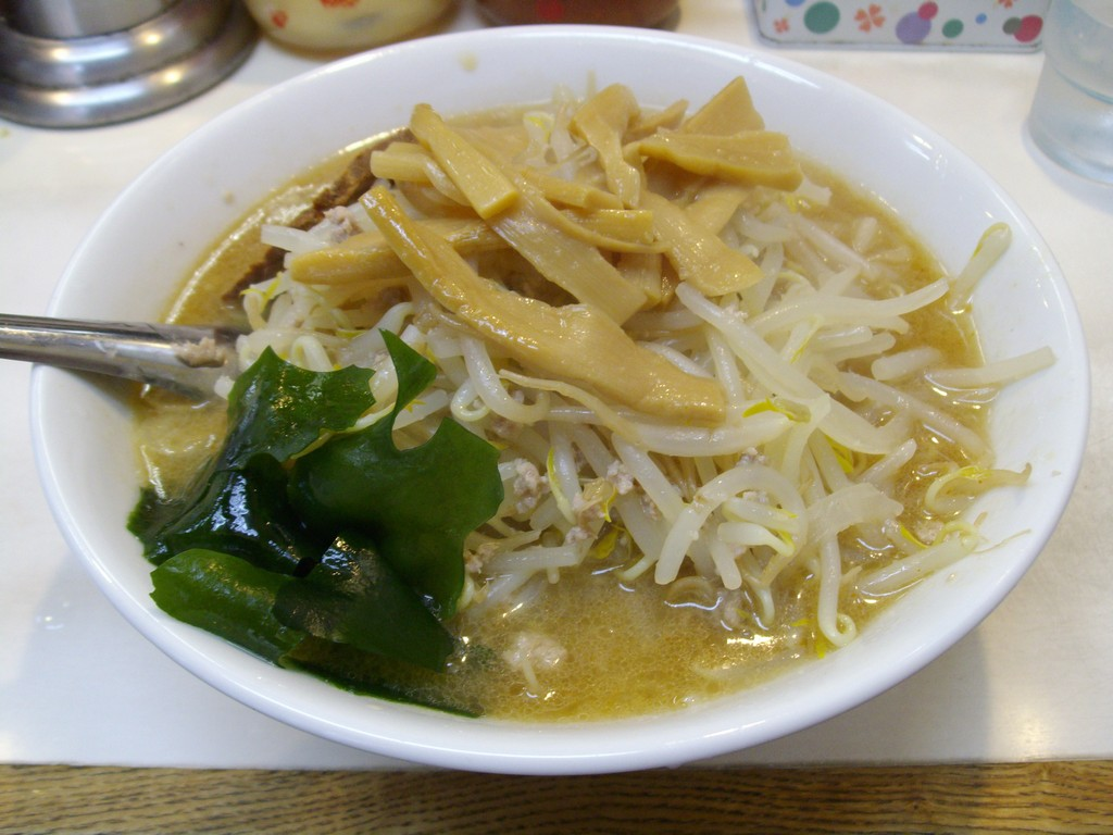 2007年撮影